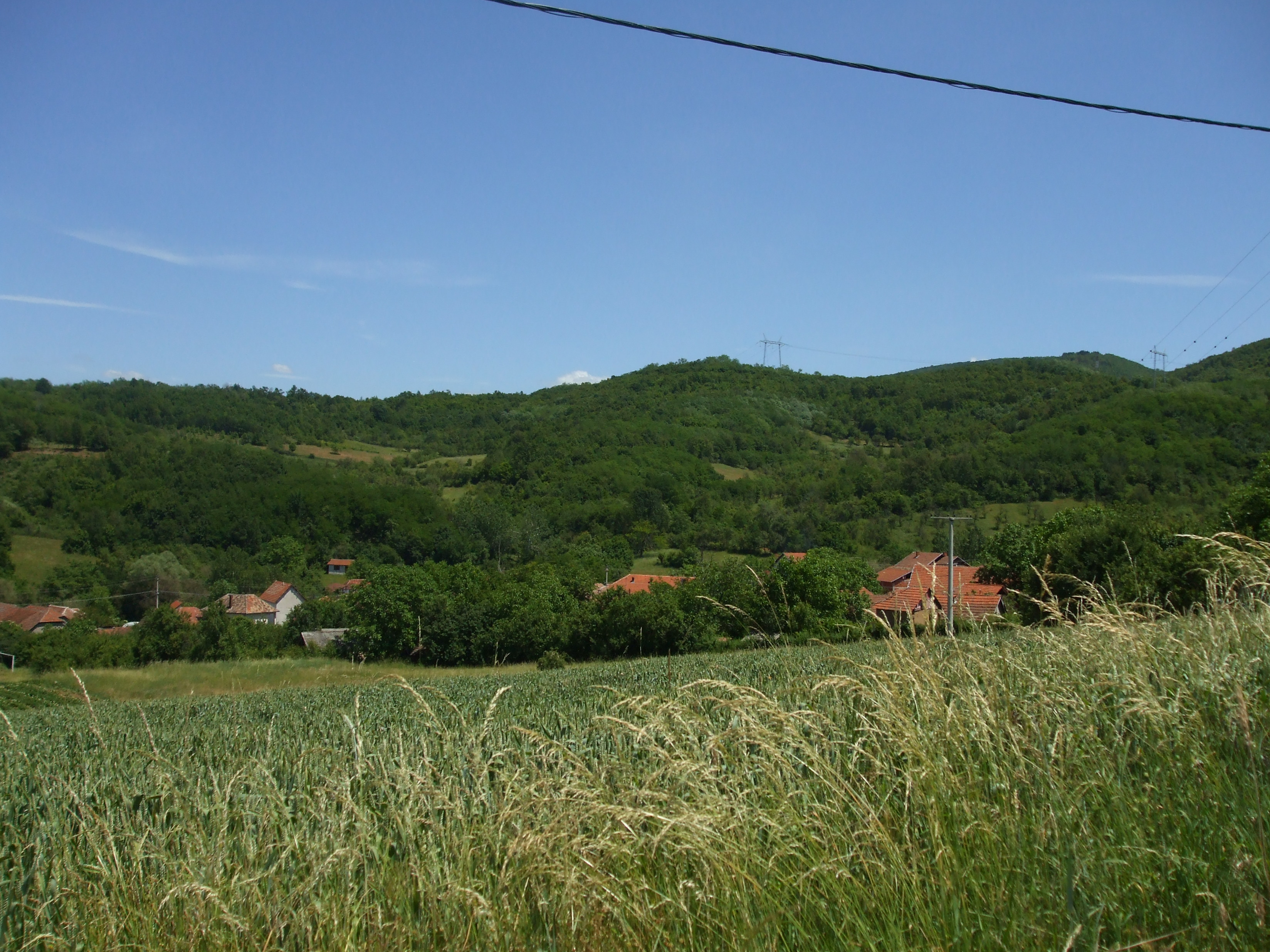 Аутор Драгољуб Здравковић.